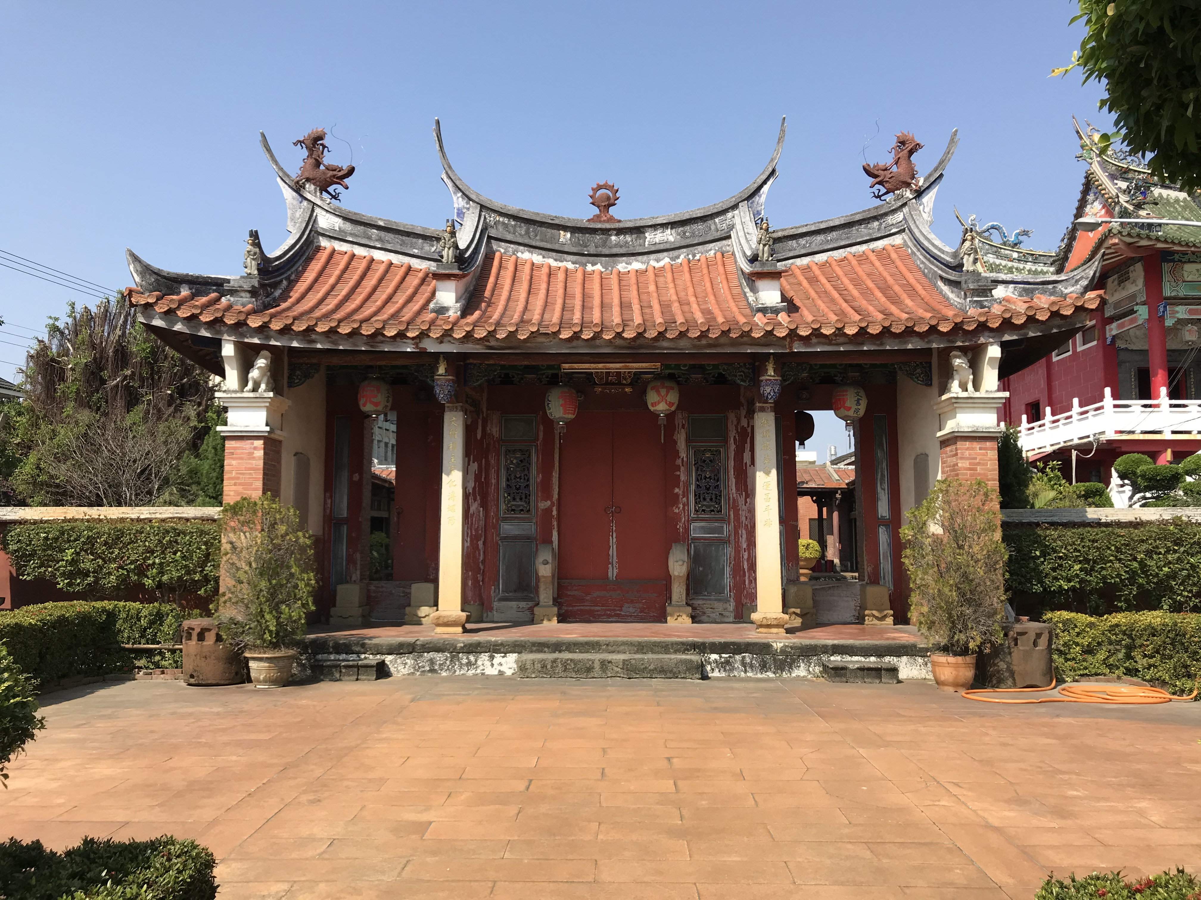 振文書院大門